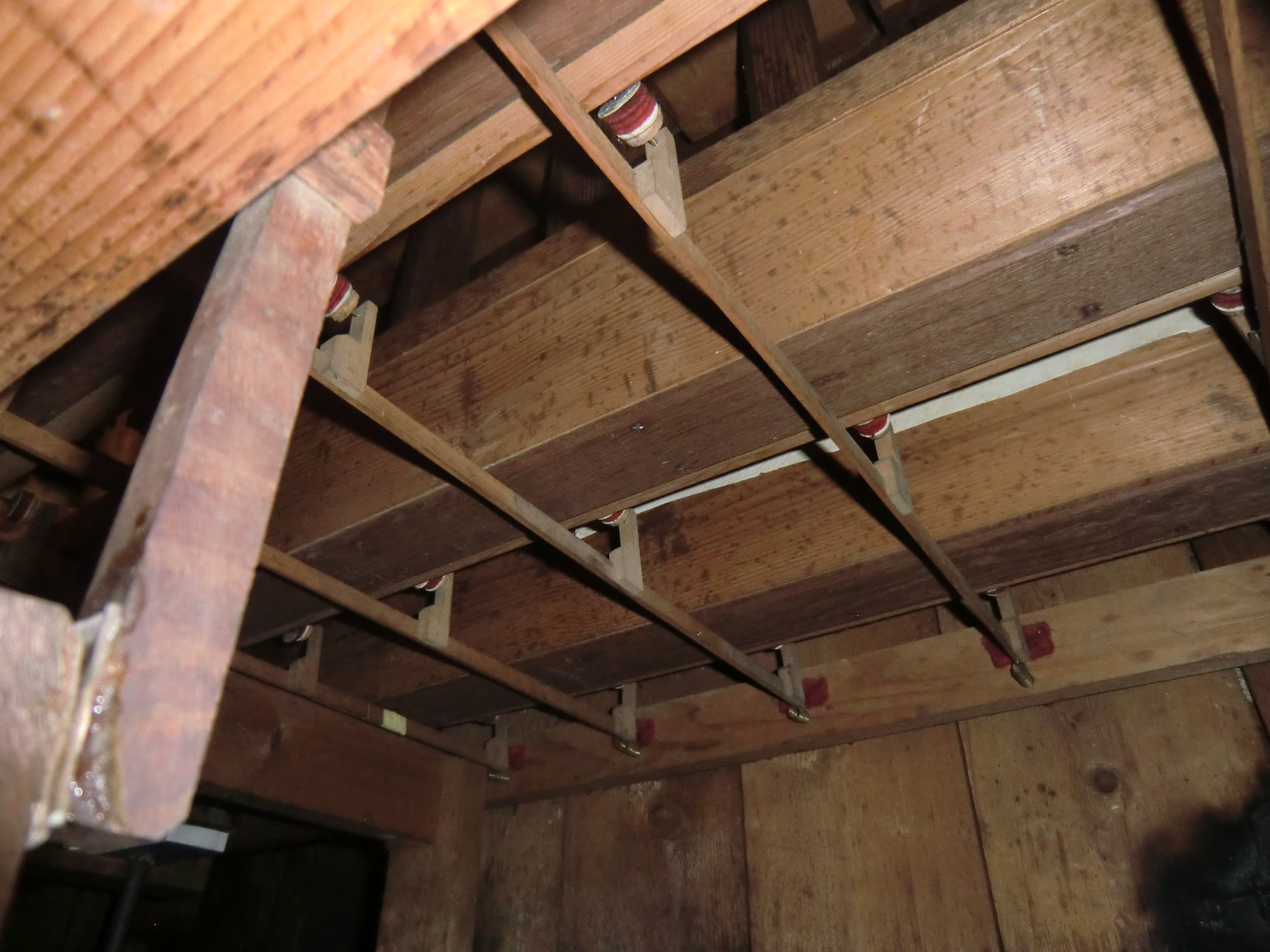 Keller-Orgel Kransberg (1876) - mechanische Hängeventillade (Blick unter die Windlade des Pedalwerks)